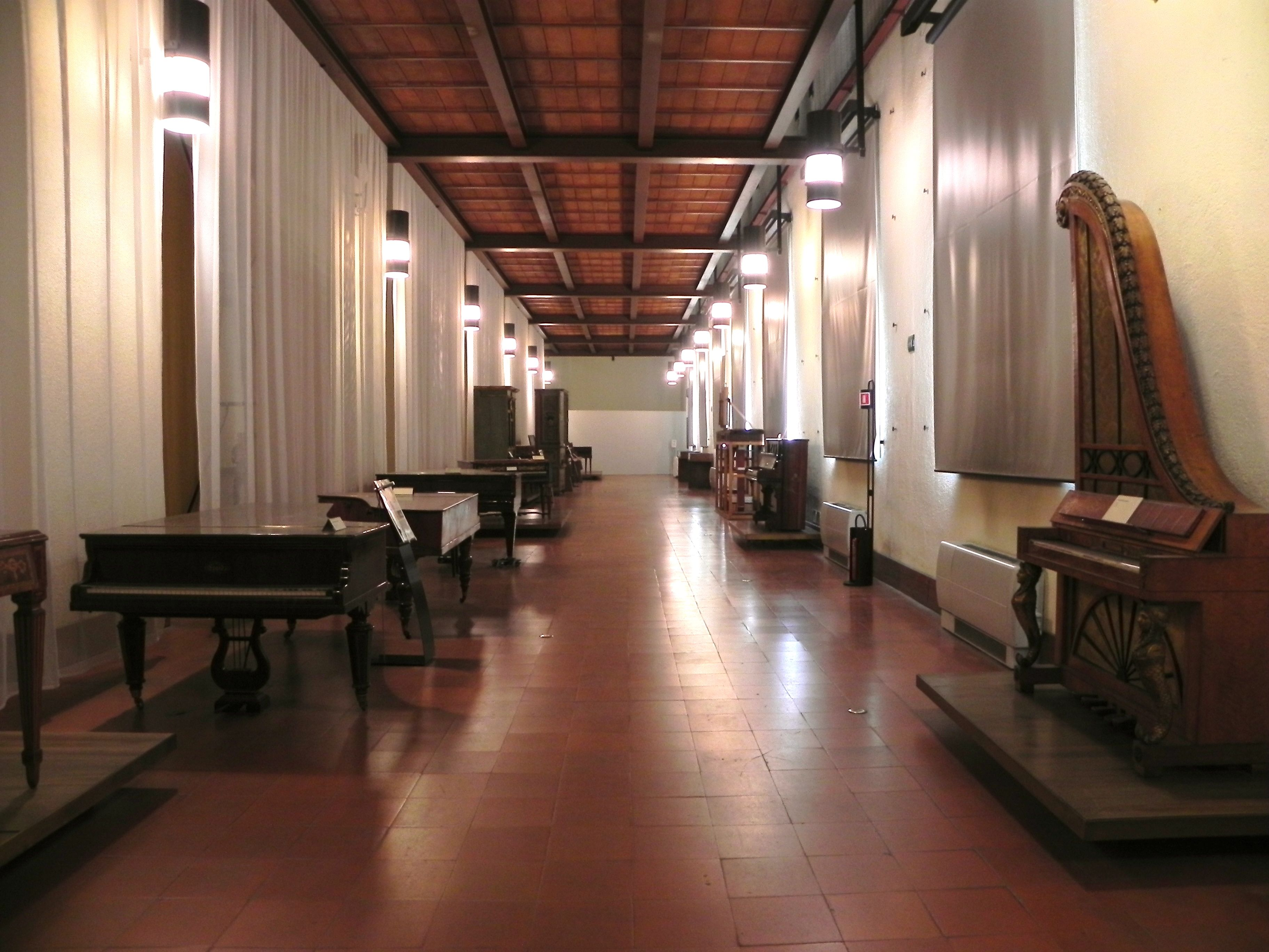 Sala della Balla - strumenti a tastiera